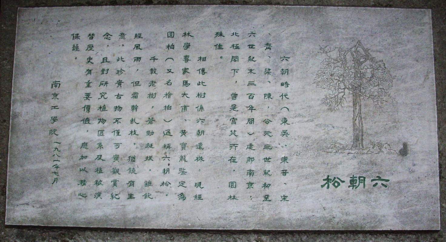 六朝松碑